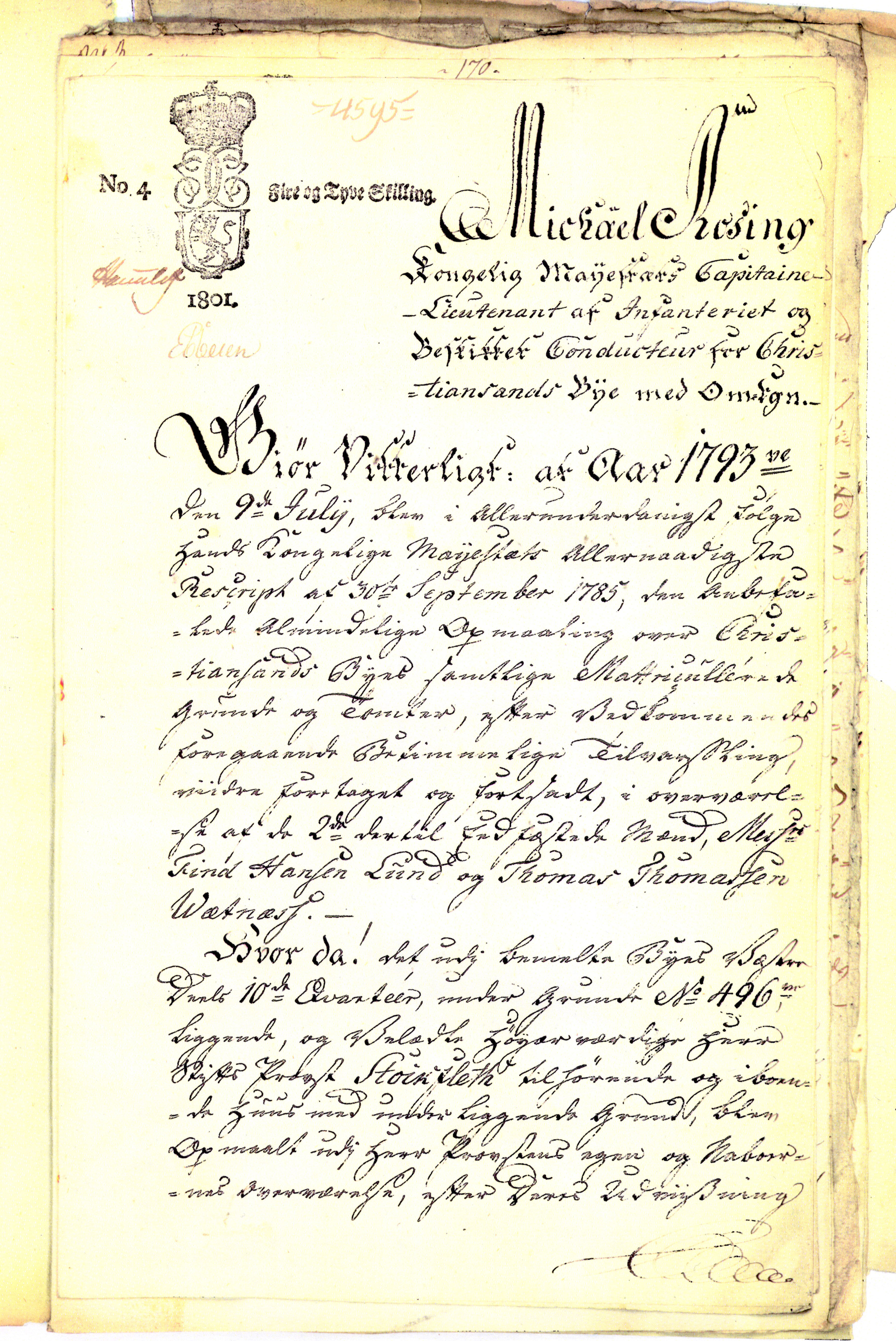 Målebrev fra 1793, tinglyst i Kristiansand 1801